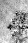 Mojmir I